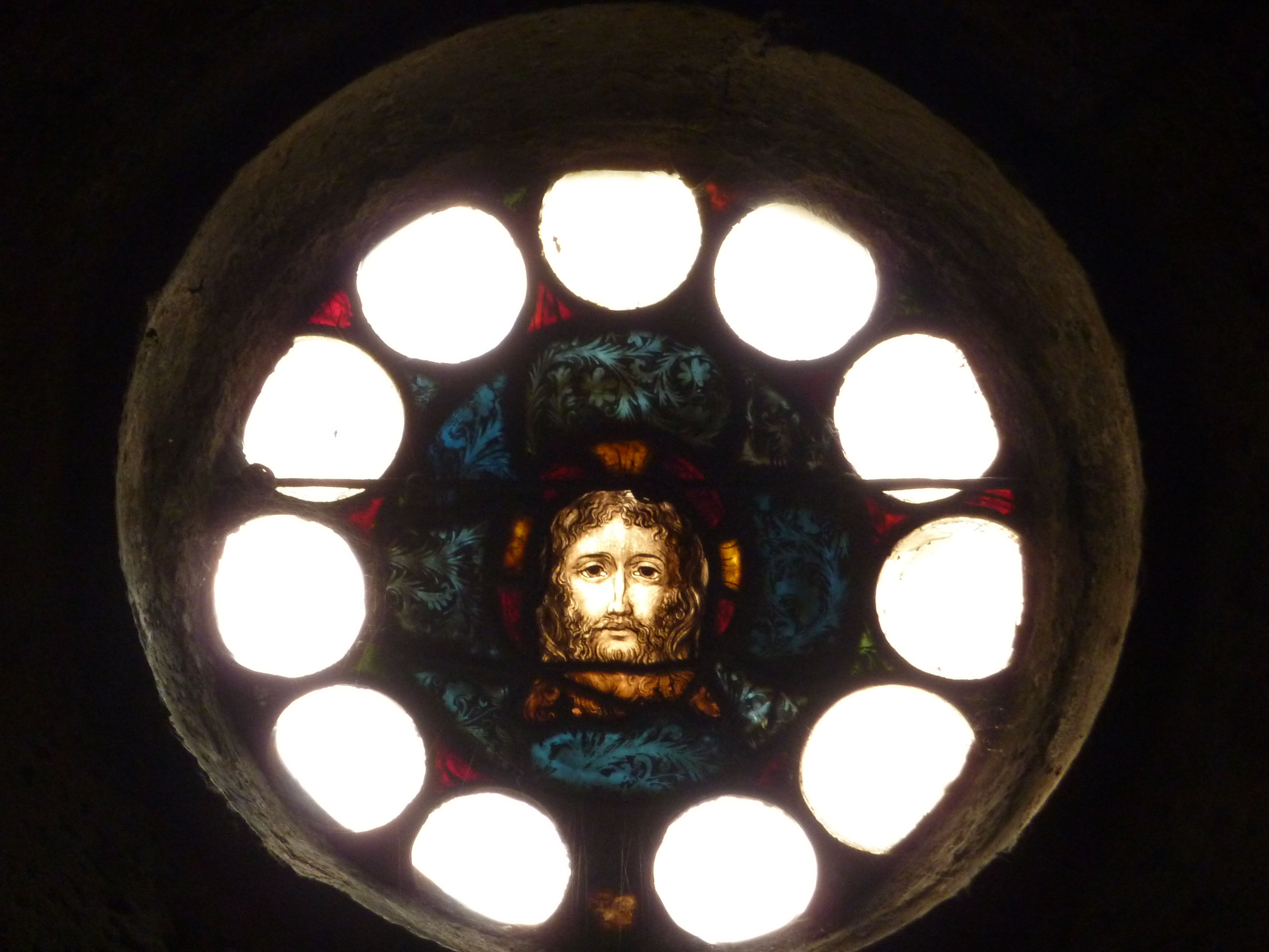 Pfarrkirche St. Veit an der Gölsen, Niederösterreich - Glasfenster Christusbüste, Rundfenster an der Westseite unter der Empore